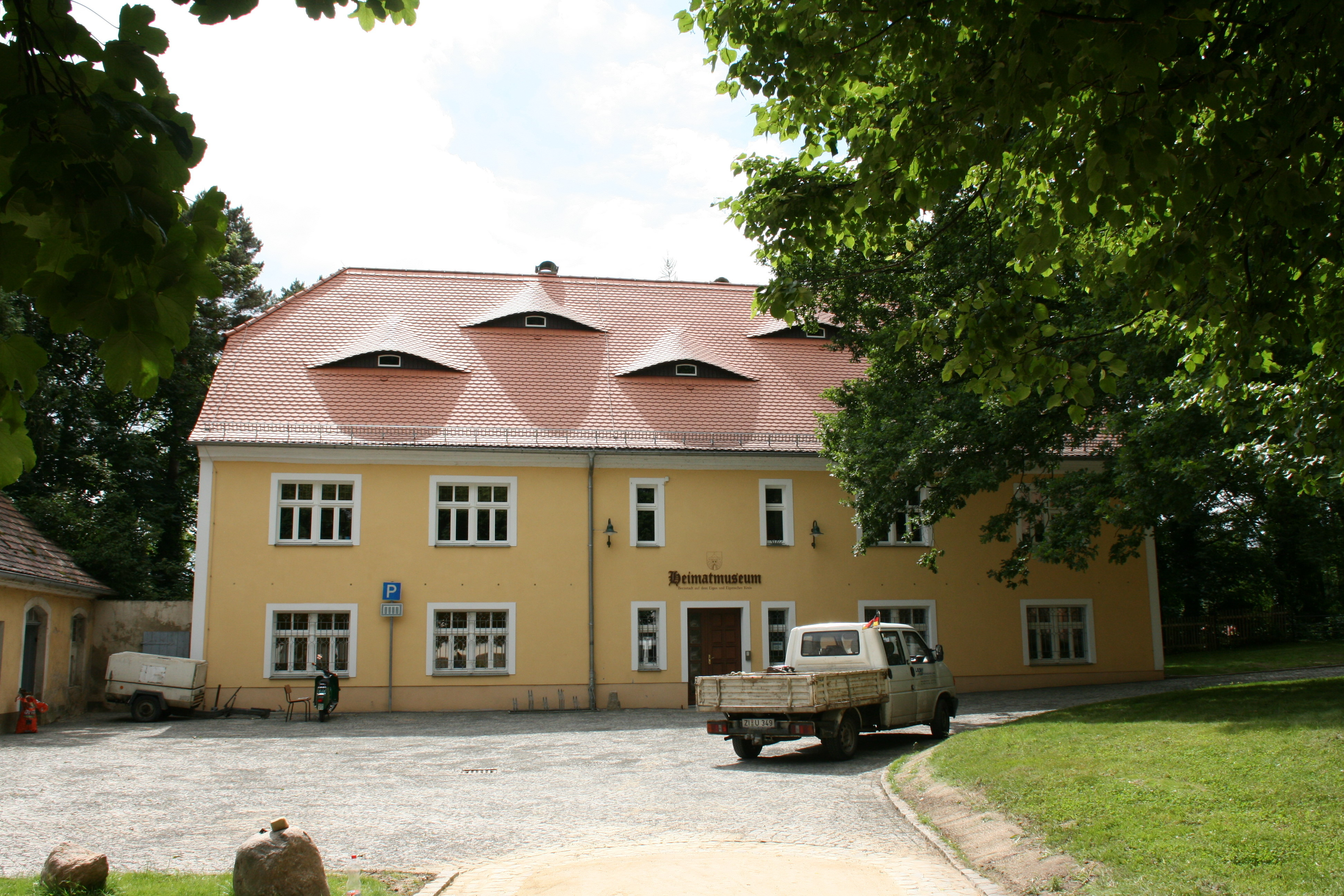 Heimatmuseum in der ehemaligen Schule, Kirchgasse in Bernstadt a. d. Eigen